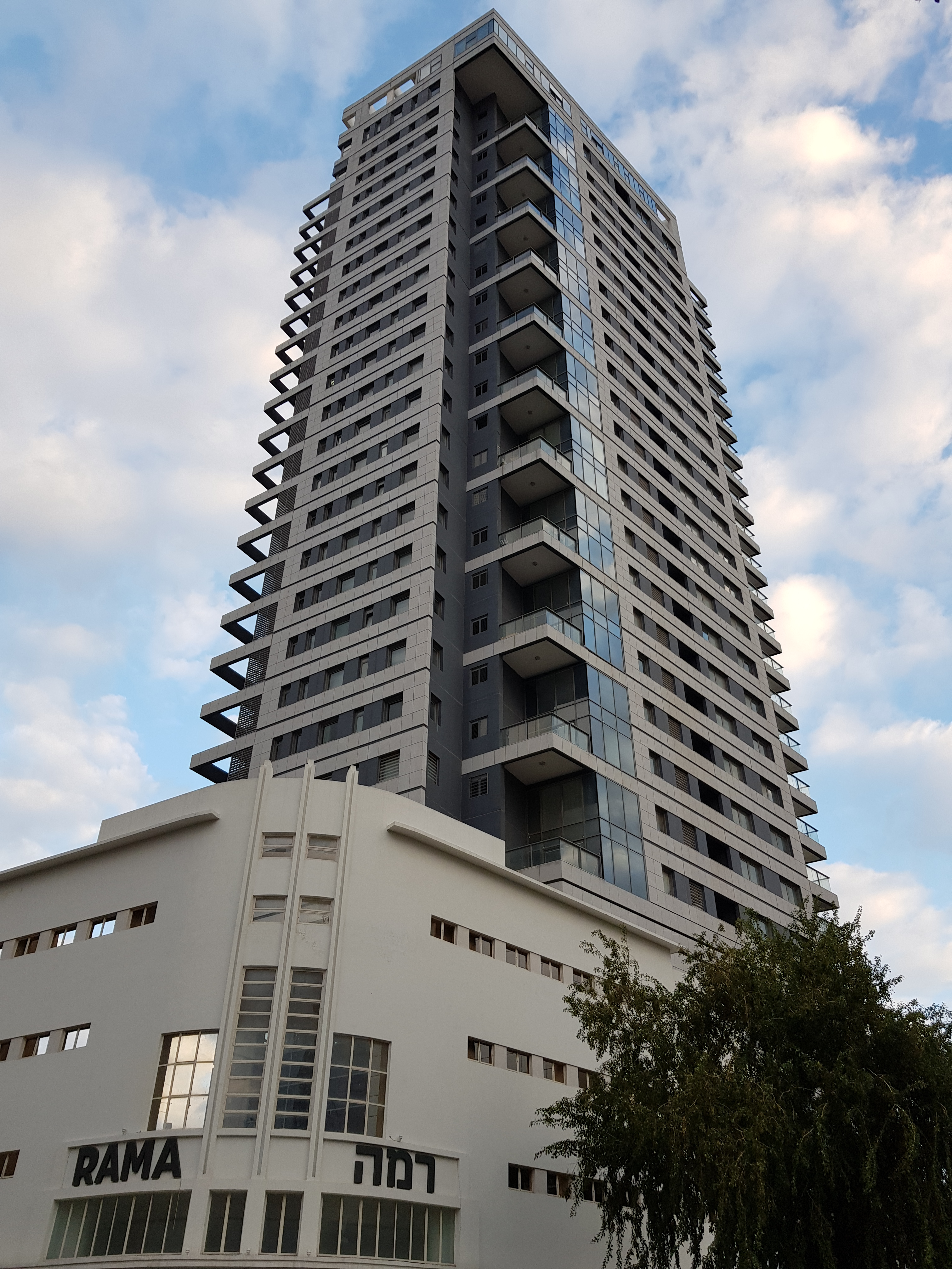 מגדל המגורים החדש המחליף את קולנוע רמה